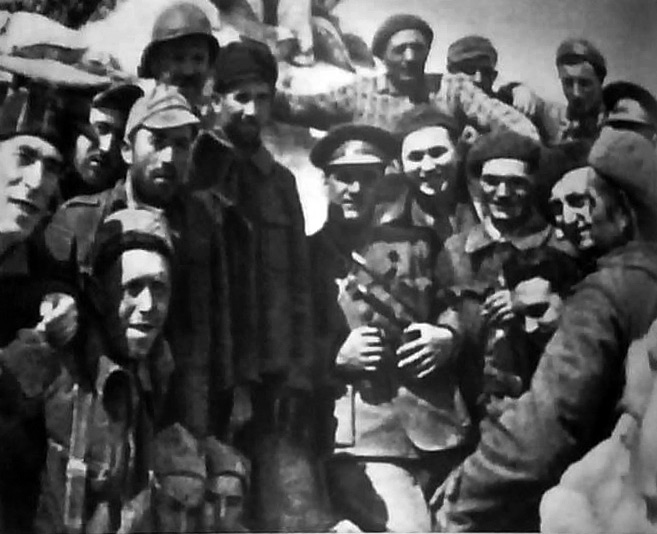 Srpskohrvatski / српскохрватски: Pukovnik Vladimir Ćopić sa češkim interbrigadistima u Španiji 1937.